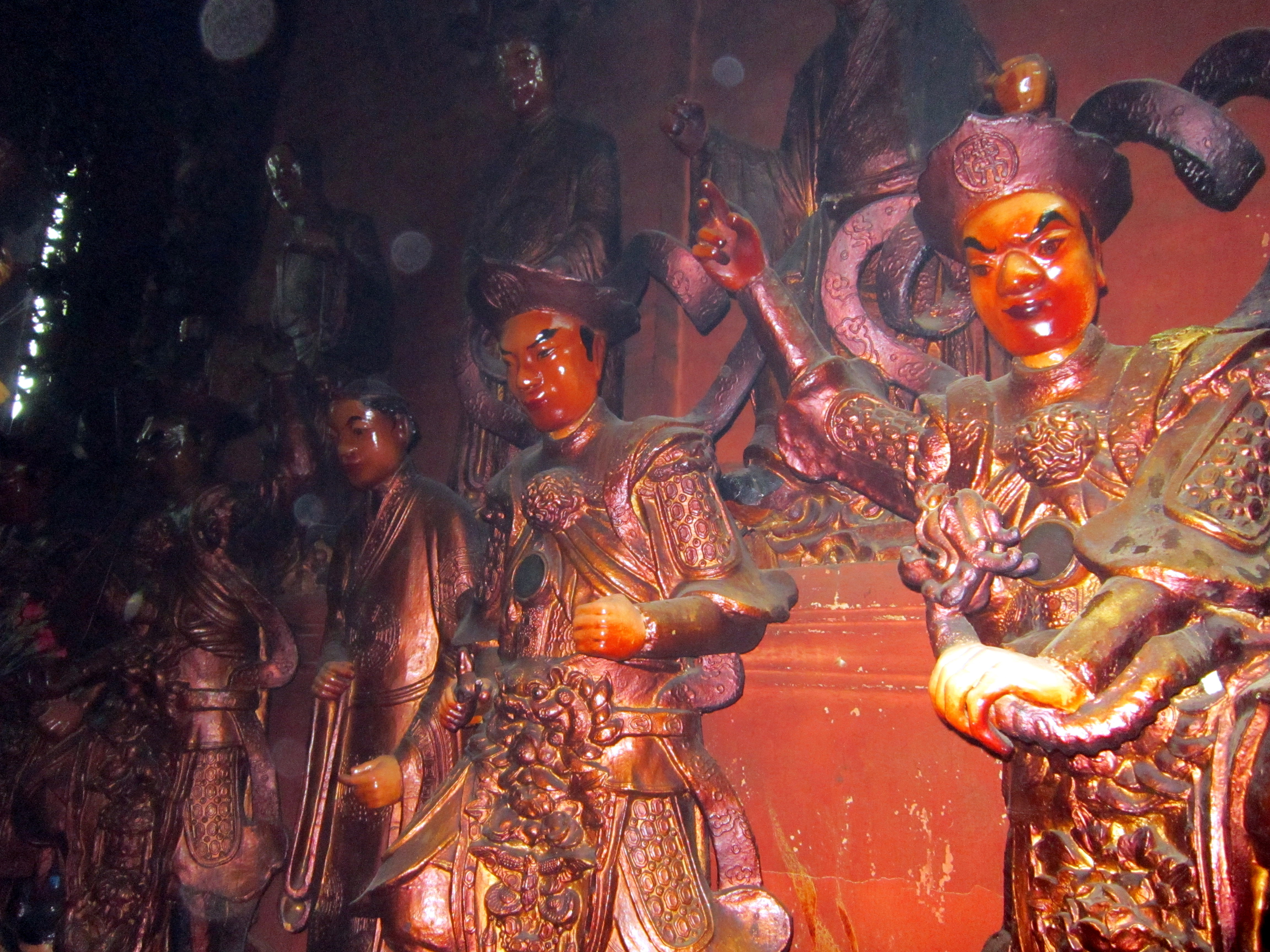 Tượng gỗ các thiên tướng trong chùa Ngọc Hoàng, hiện tọa lạc tại số 73 đường Mai Thị Lựu, quận 1, Thành phố Hồ Chí Minh, Việt Nam.